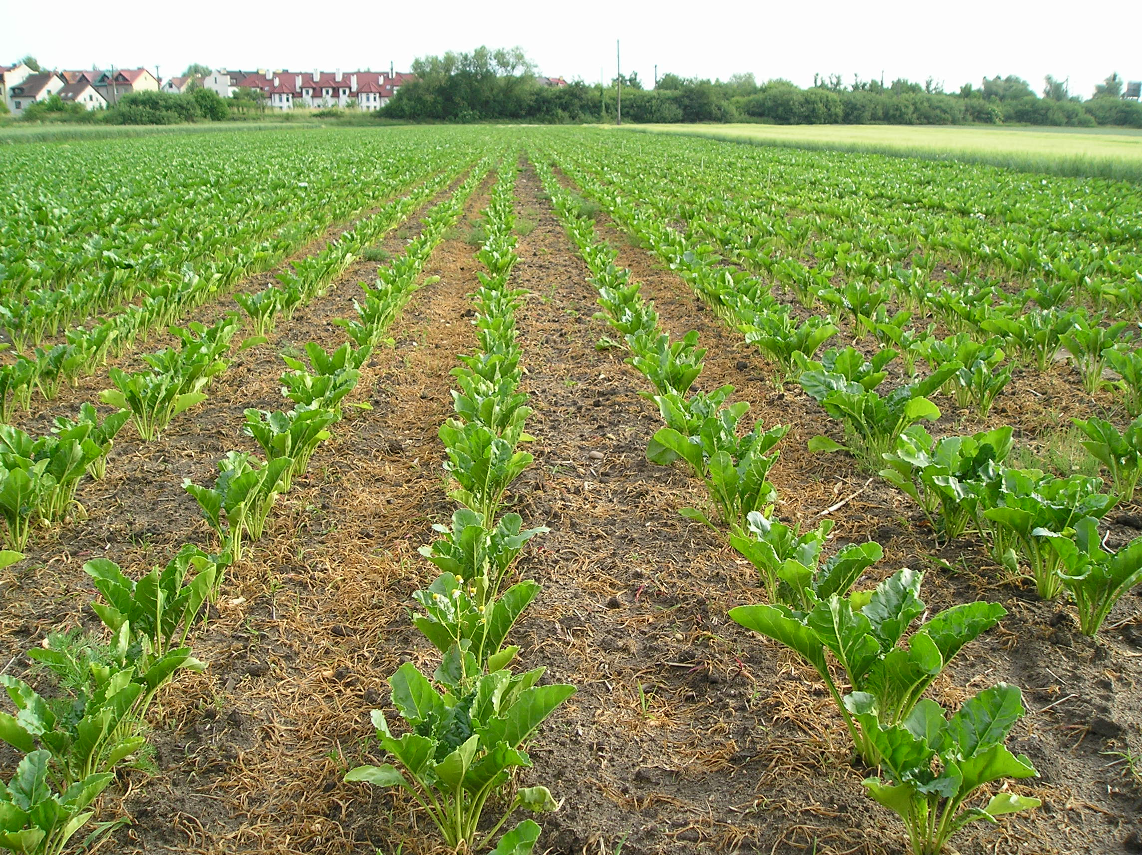 W burakach cukrowych zniszczona chwastnica jednostronna.